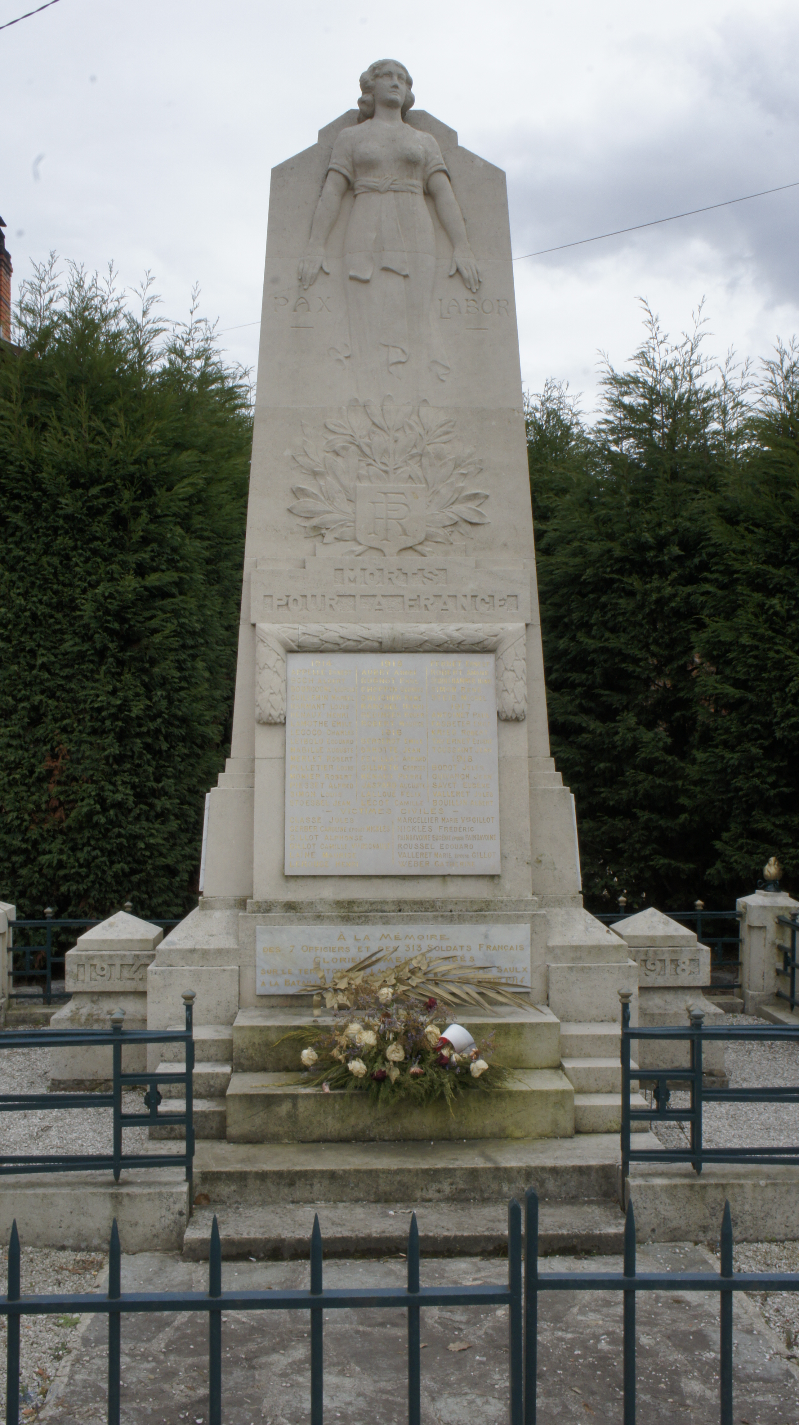 monument AUX MORTS DE la commune de Pargny .